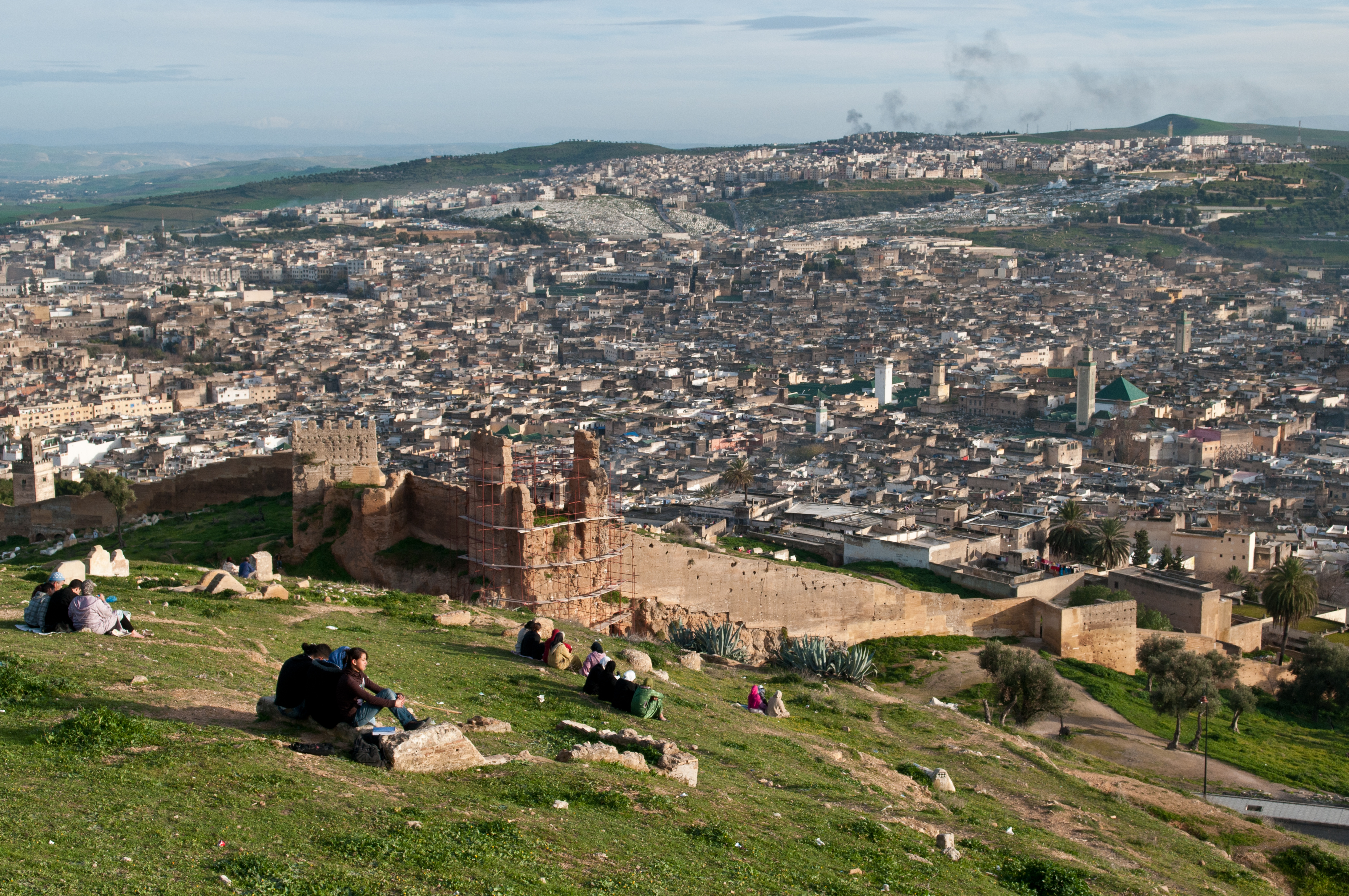 Fes